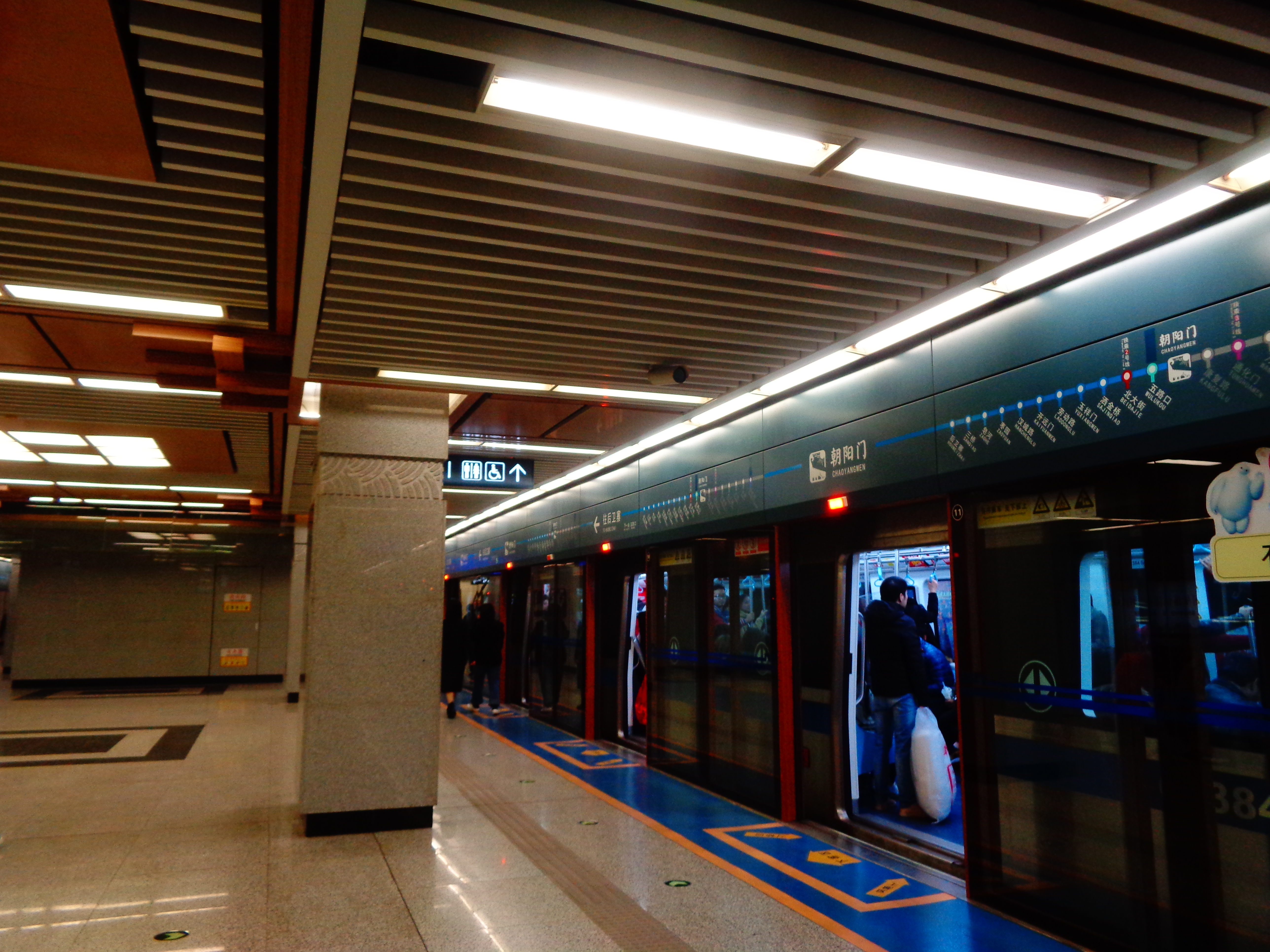 西安地铁朝阳门站，包括站台闸机和出入口